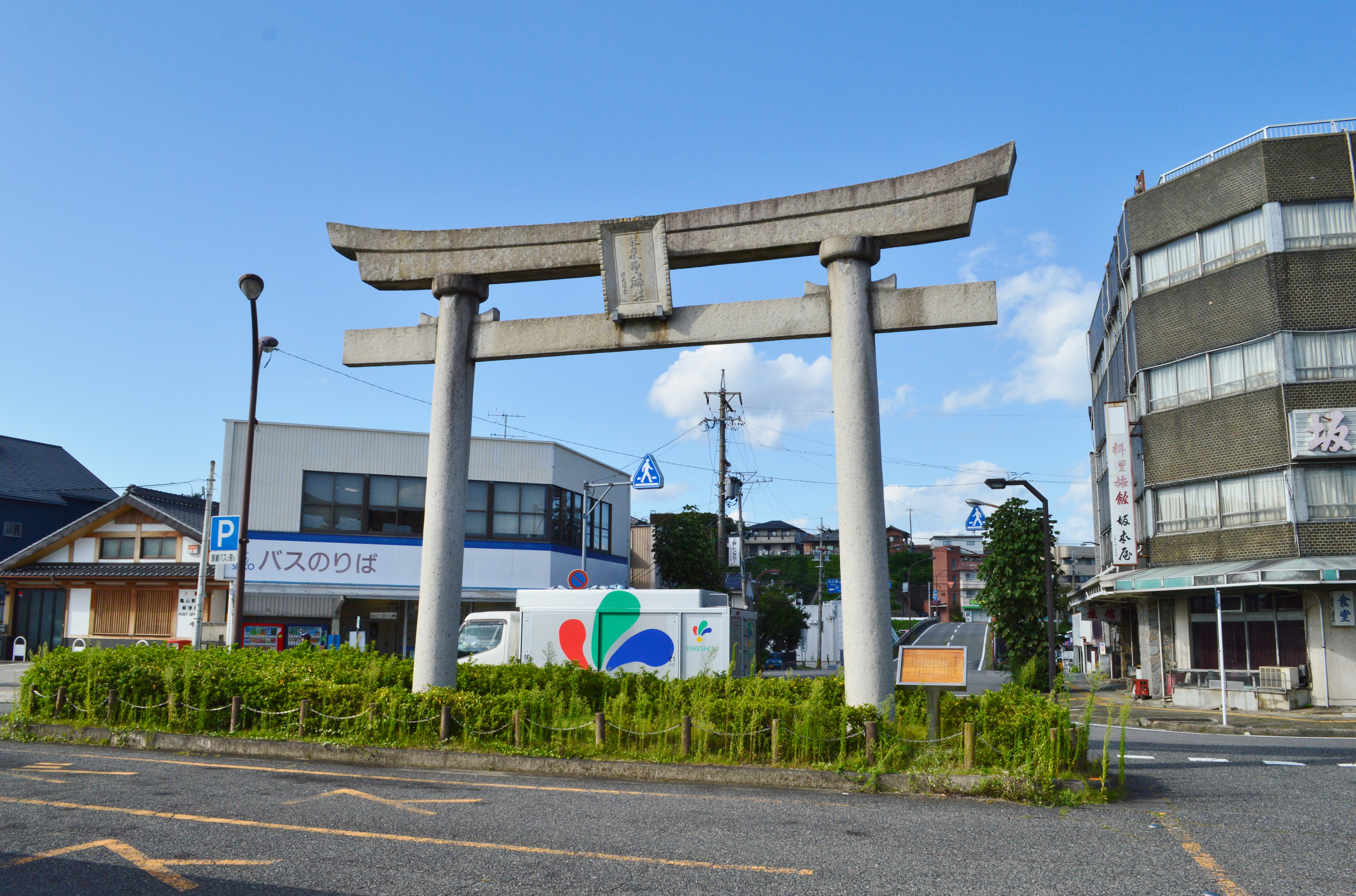 亀山駅 (三重県) 駅前の鳥居